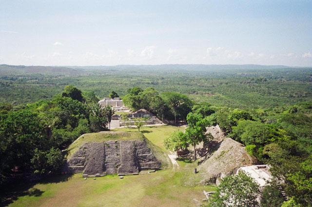 Belize ruins